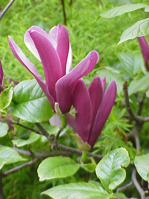 Magnolia liliiflora, Family: Magnoliaceae, Image no. 4